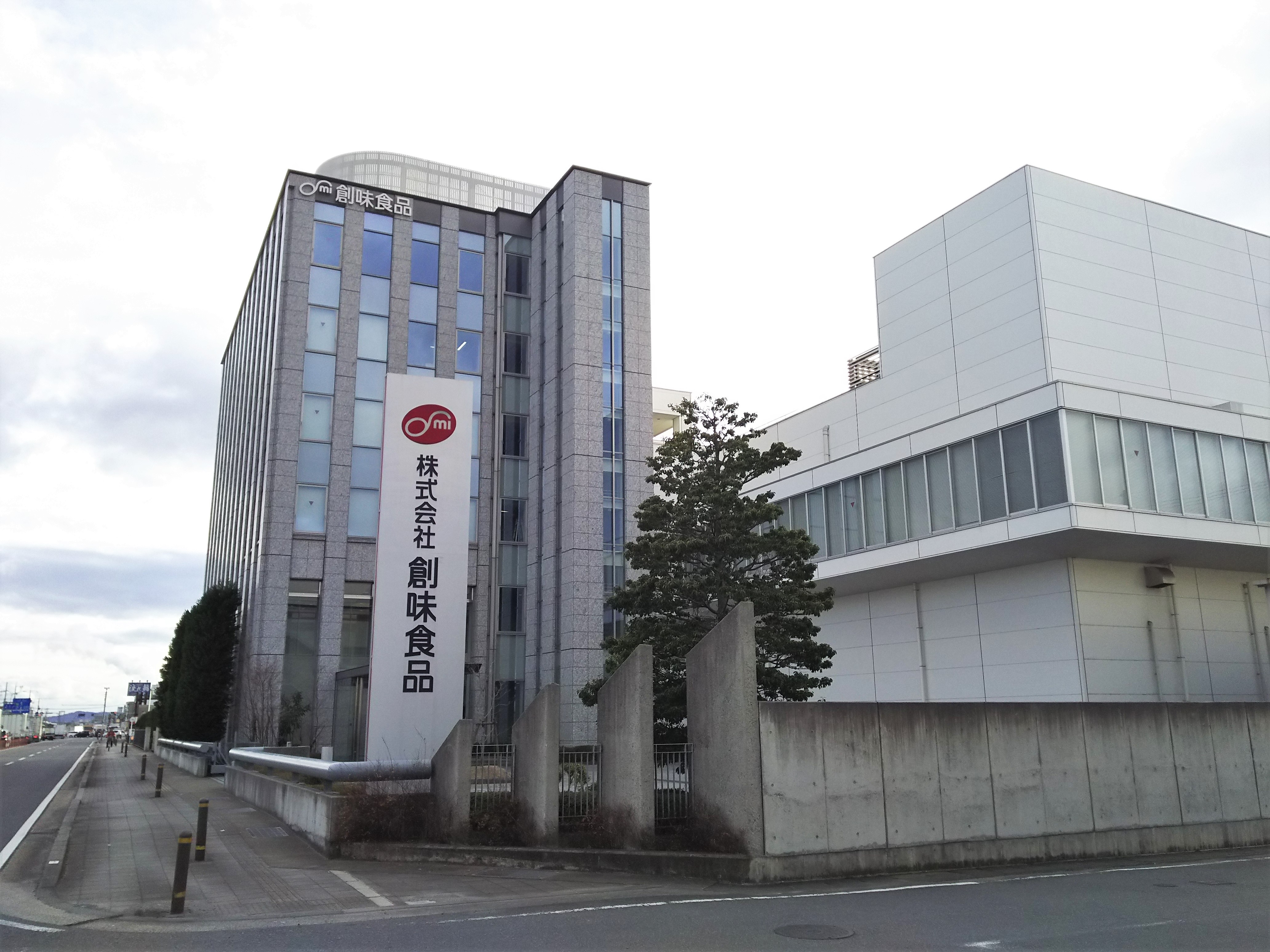 創味食品本社（京都市伏見区）